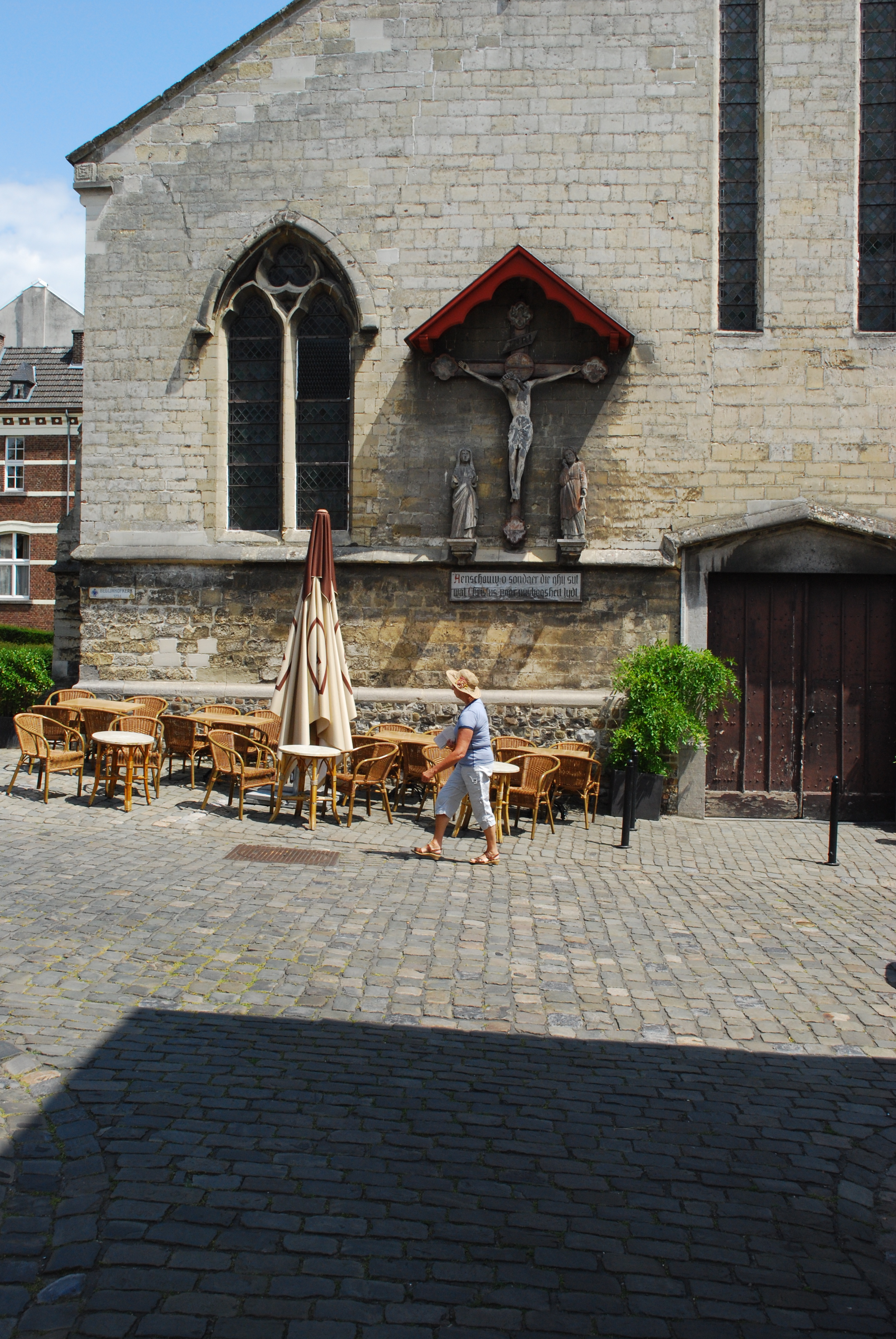 L'église du béguinage à Tongres.